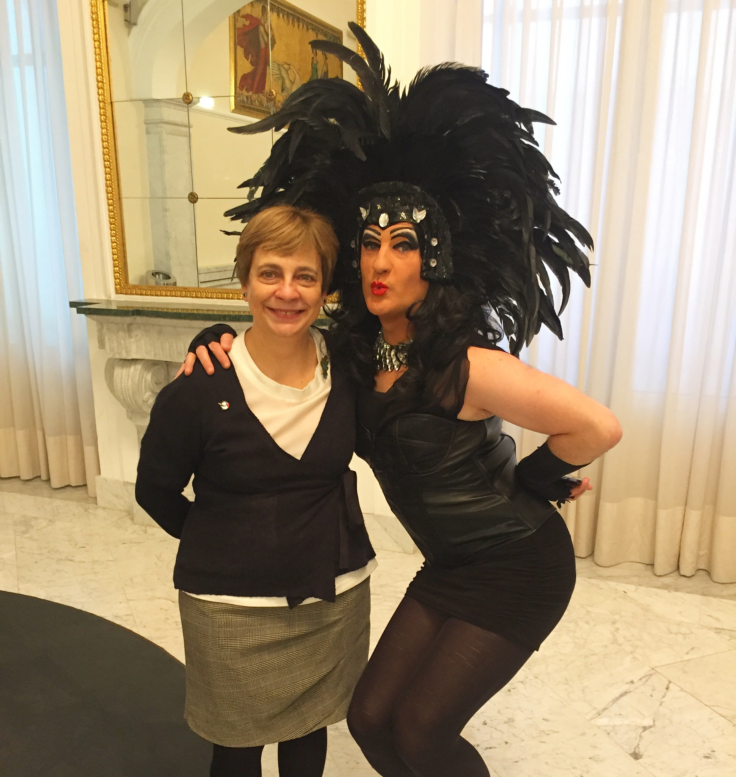 Prentsaurreko eguneko argazkia. / Fotografía de la rueda de prensa.